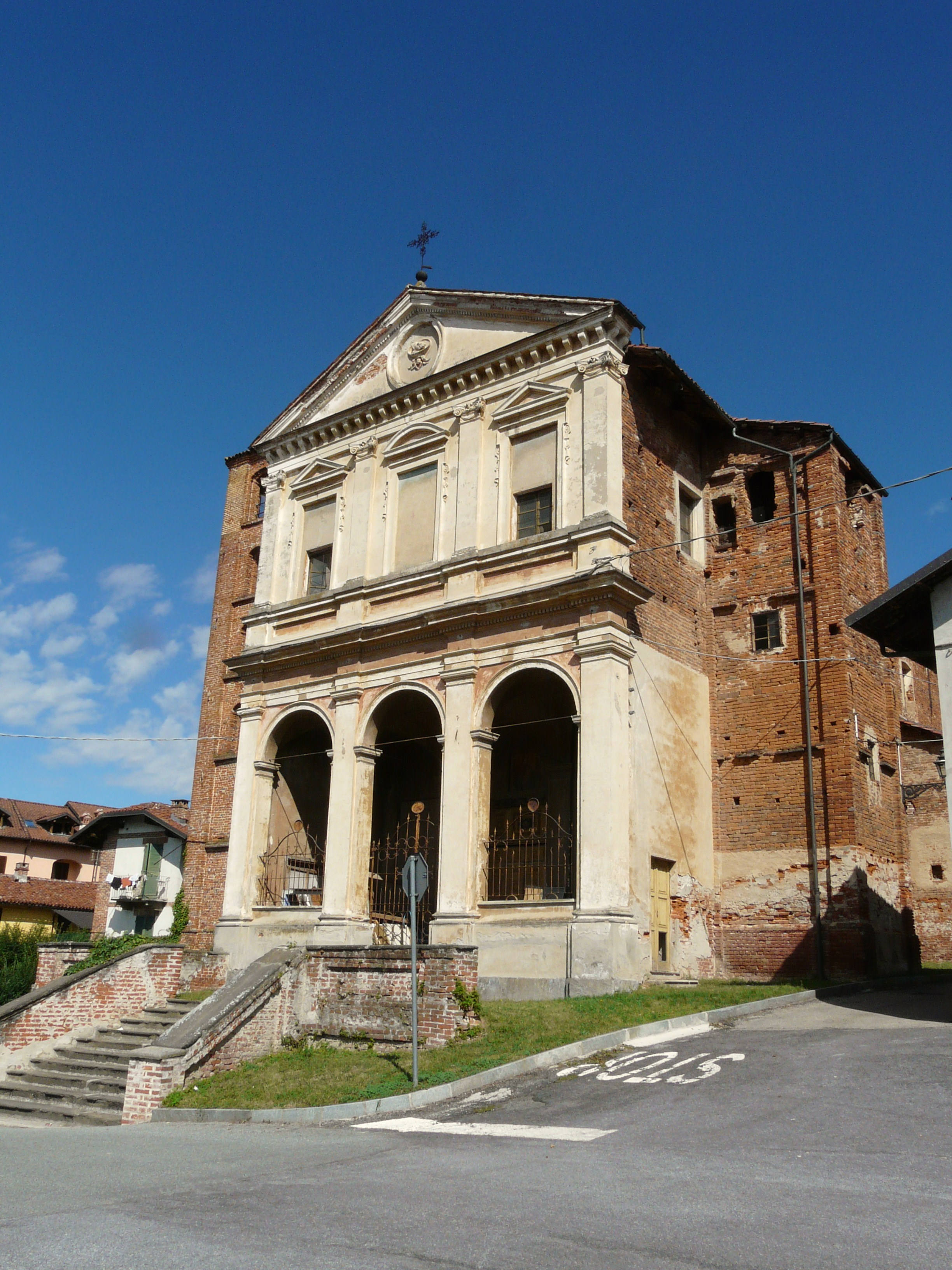 Facciata della chiesa di San Giovanni Decollato, Marene, Piemonte, Italia